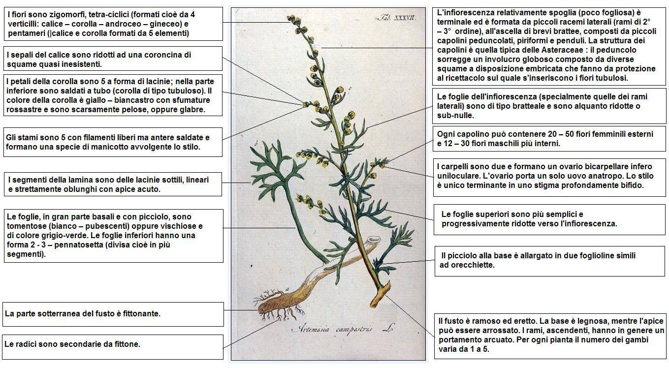 Artemisia campestris - DESC